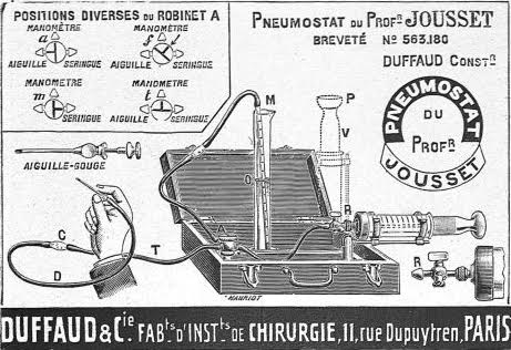 Publicité pour le pneumostat du professeur Jousset.